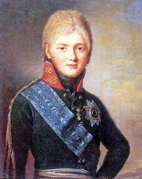 Жан Луи Вуаль. Портрет Александра I. 1802